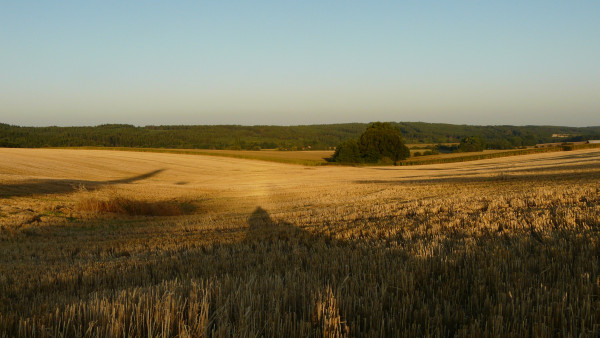 Pole s obilím u obce Polomí